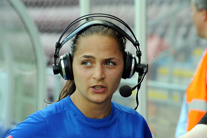 Footballer Elena Sadiku